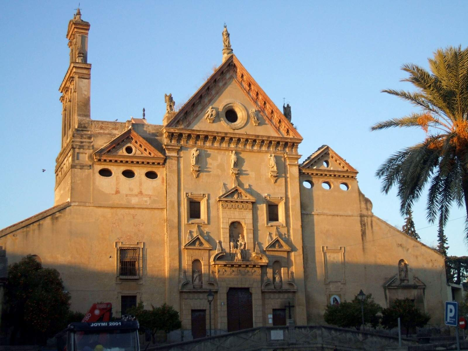 Iglesia de Nuestra Señora de Gracia (Trinitarios), en Córdoba, España